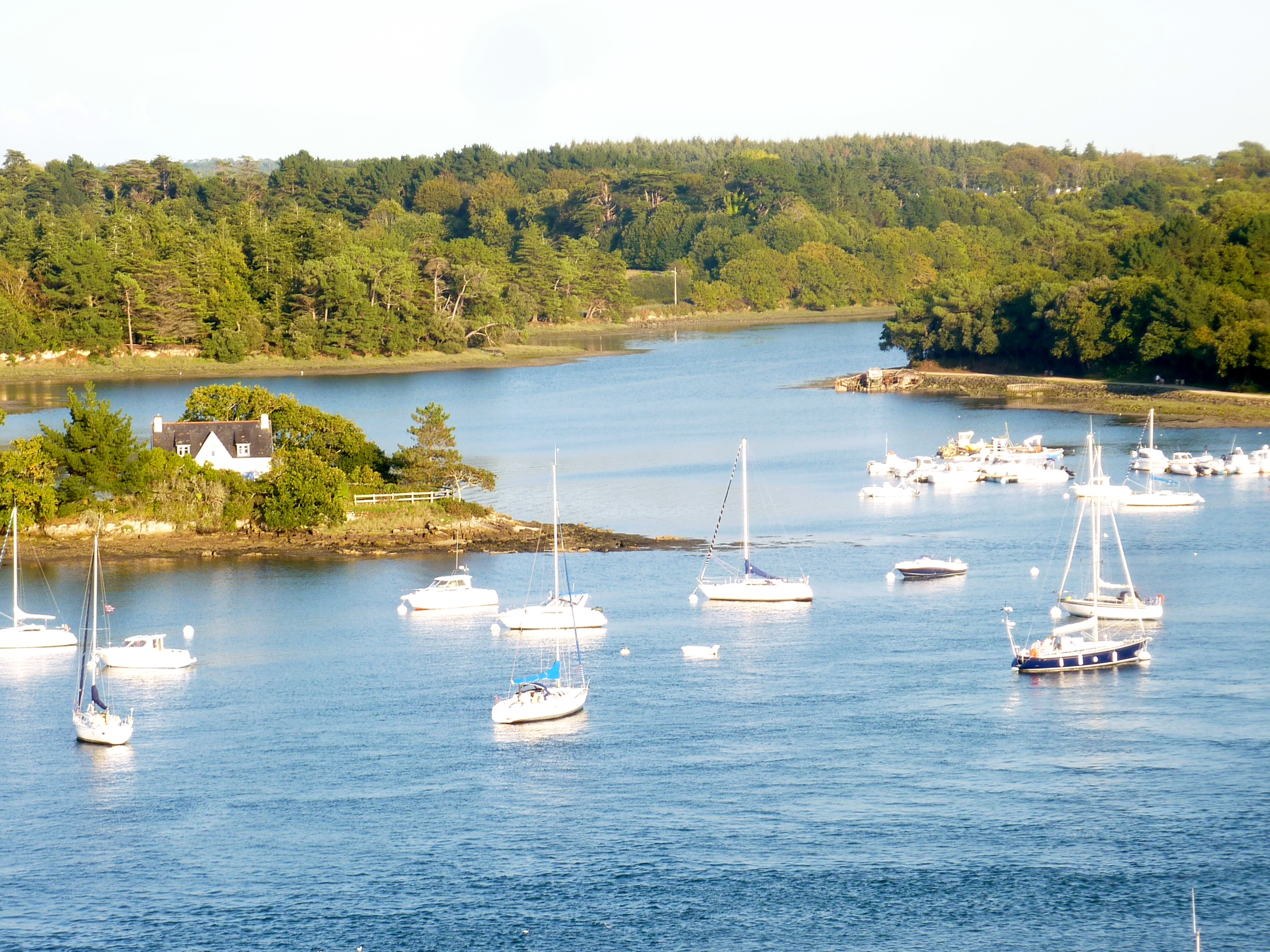 L'anse de Penfoul (anse annexe de l'Odet) à Clohars-Fouesnant et Bénodet, vue du pont de Cornouaille ; sur la presqu'île à gauche de la photo se trouve l'ancienne maison des gardes-côtes, désormais transformée en gite (commune de Clohars-Fouesnant